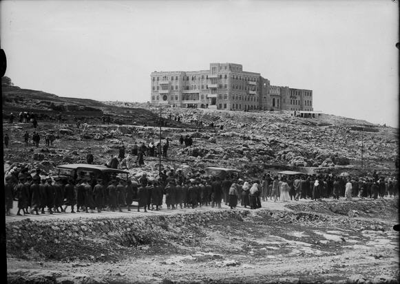 ירושלים - חגיגת העברת בית-היתומים דיסקין לבנין החדש, המונים לפני הבנין החדש.